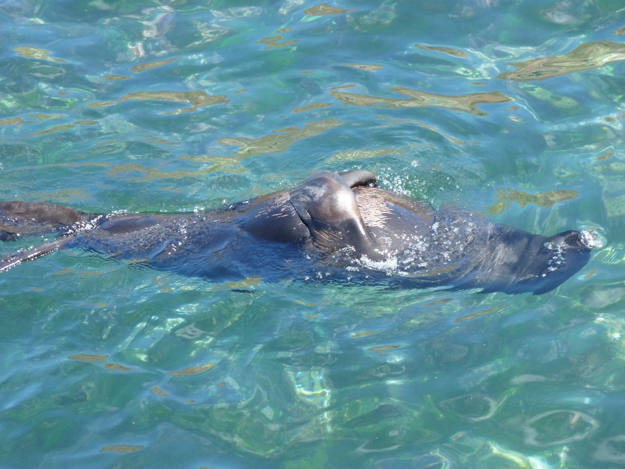 Lobo Fino de Juan Fernández, hembra o juvenil